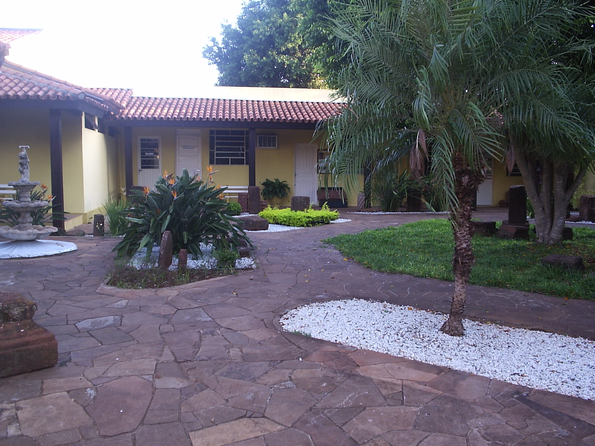 Pátio do Museu Municipal Dr. José Olavo Machado, em Santo Ângelo, Rio Grande do Sul.